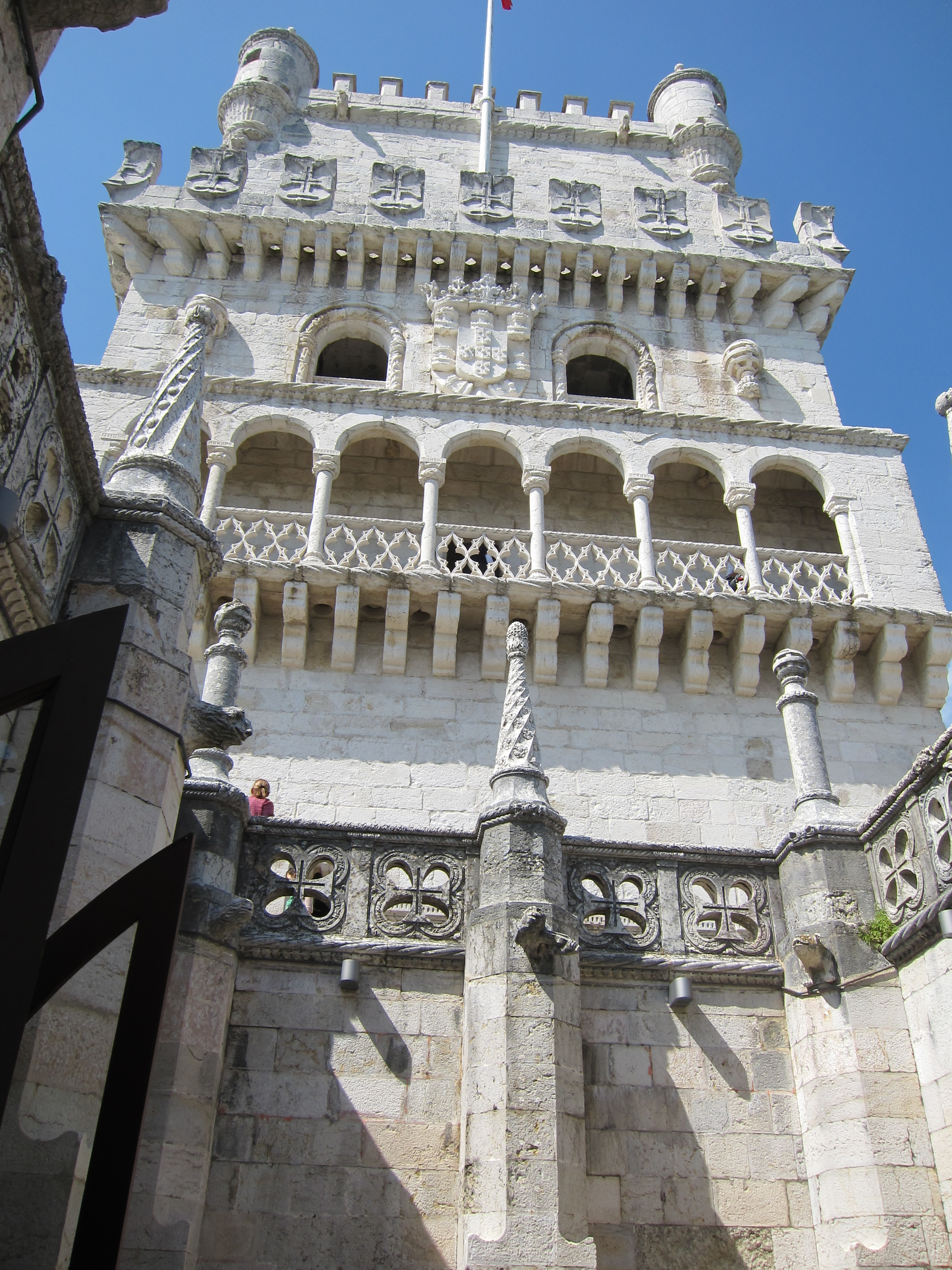 Detailansicht der Südfassade des Torre de Belém